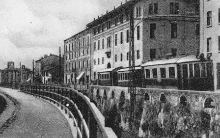 Brescia, via Trento, 1930s